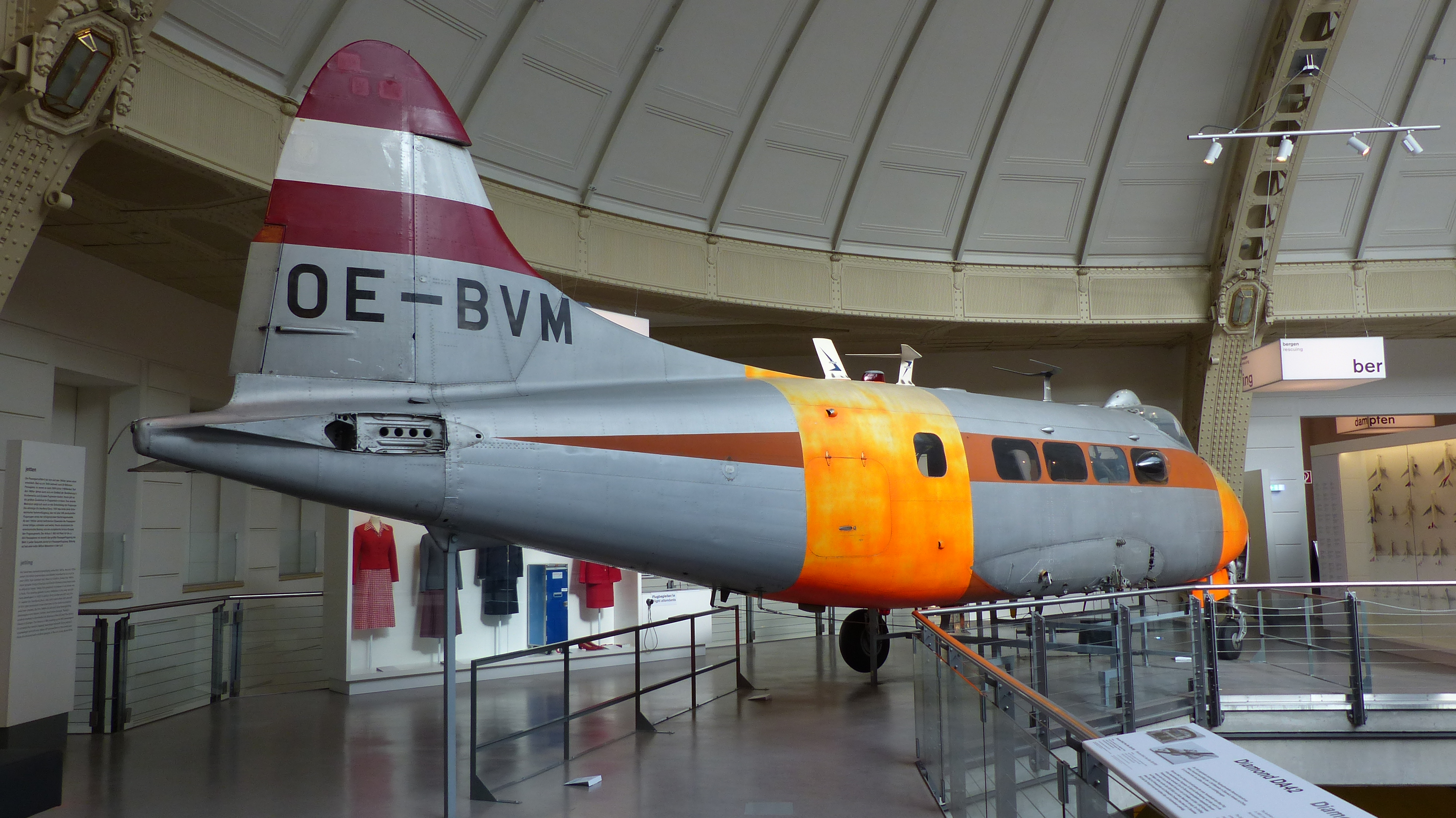 De Havilland DH.104 Mk.5 Dove (OE-BVM), 1957; Exponat im Technischen Museum Wien